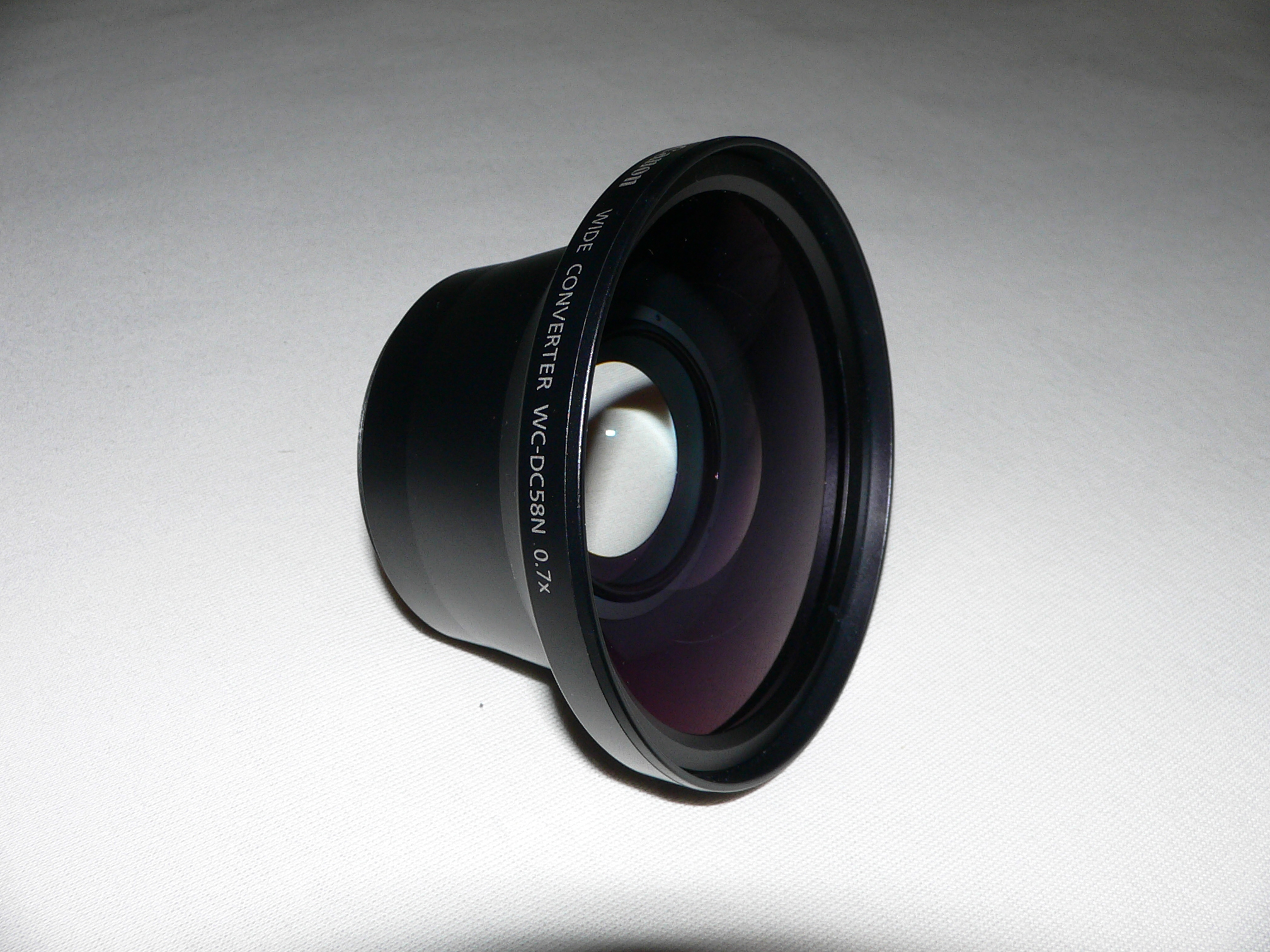 Wide Angle Converter